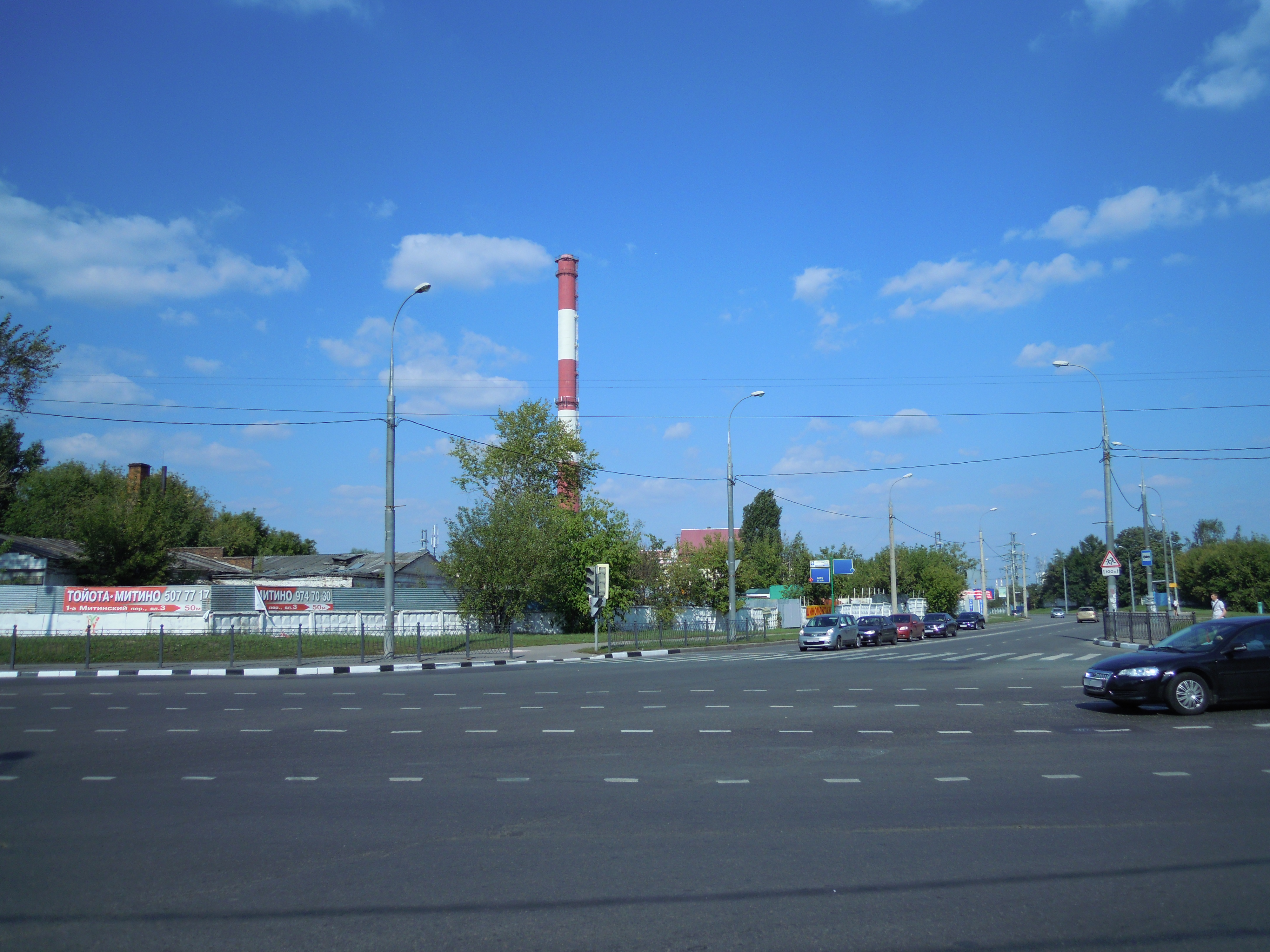 Moskvo, Mitino, kuniĝo de la 1‑a Mitina strateto (1‑j Mitinskij pereulok) kaj strato Mitinskaja. Fotita rigarde proksimume al nord‐oriento.